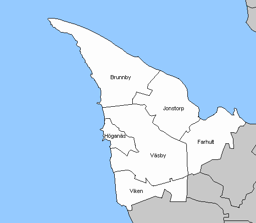 socken in Höganäs